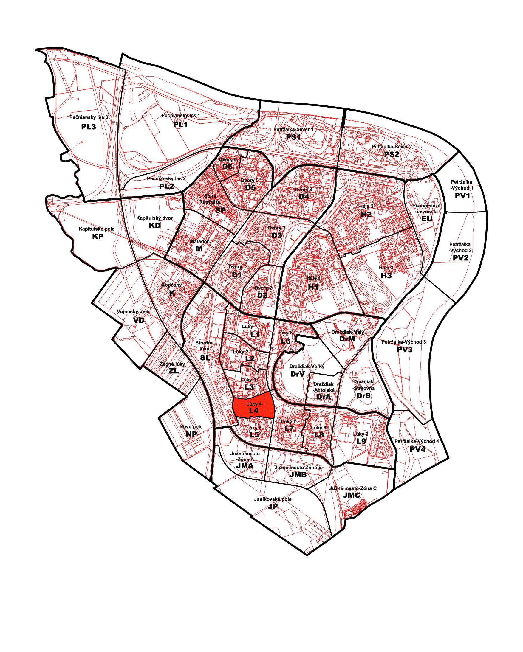 Poloha petržalskej miestnej časti